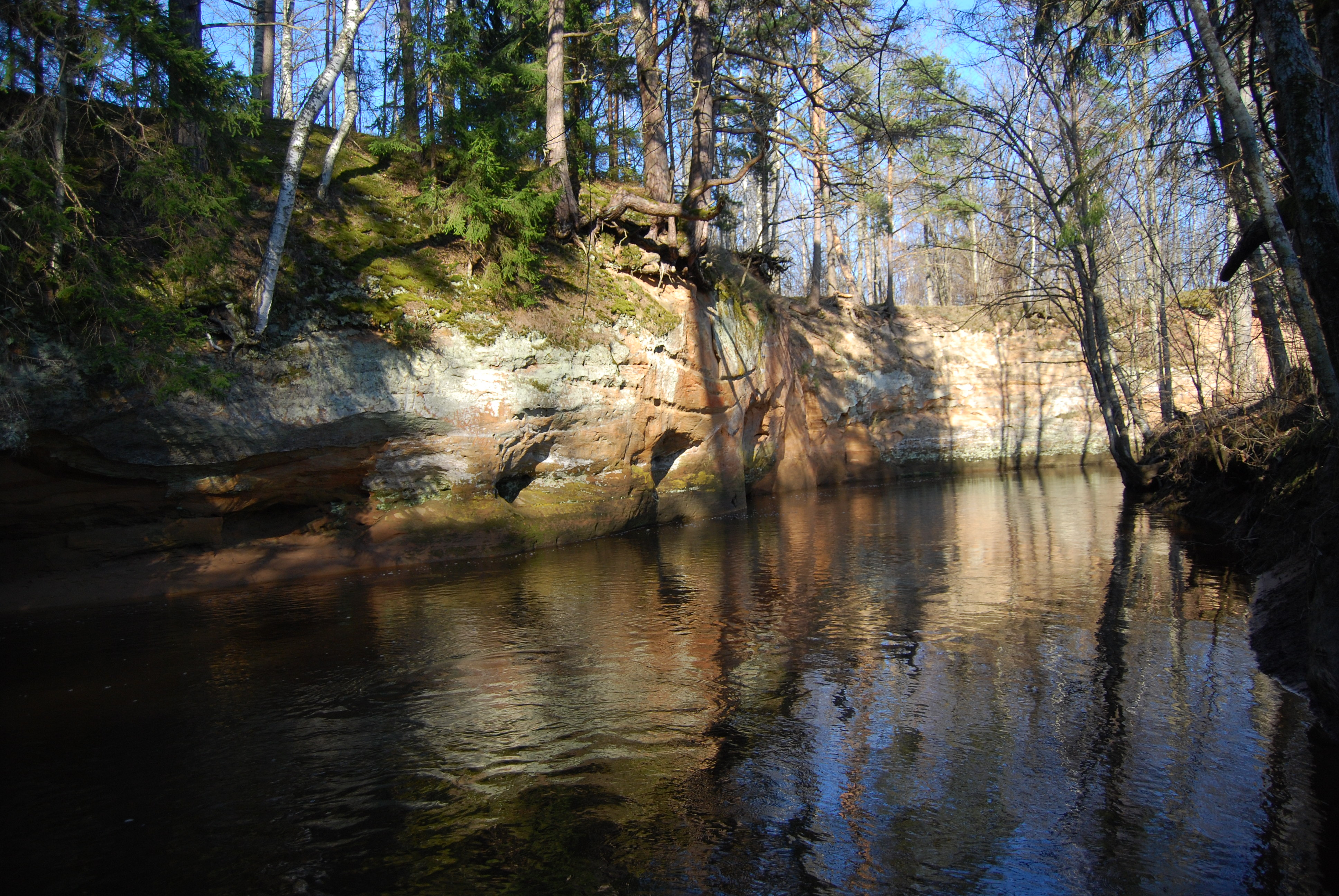 Lūrmaņu atsegumi